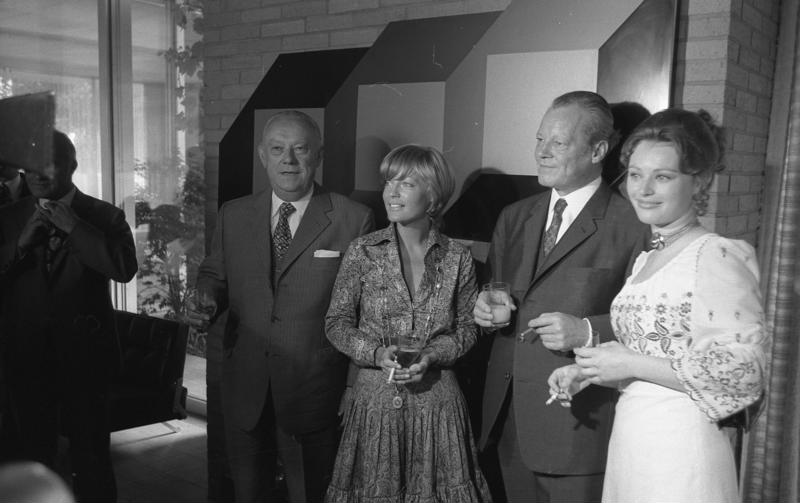 Bundeskanzler Willy Brandt empfängt Filmschauspieler